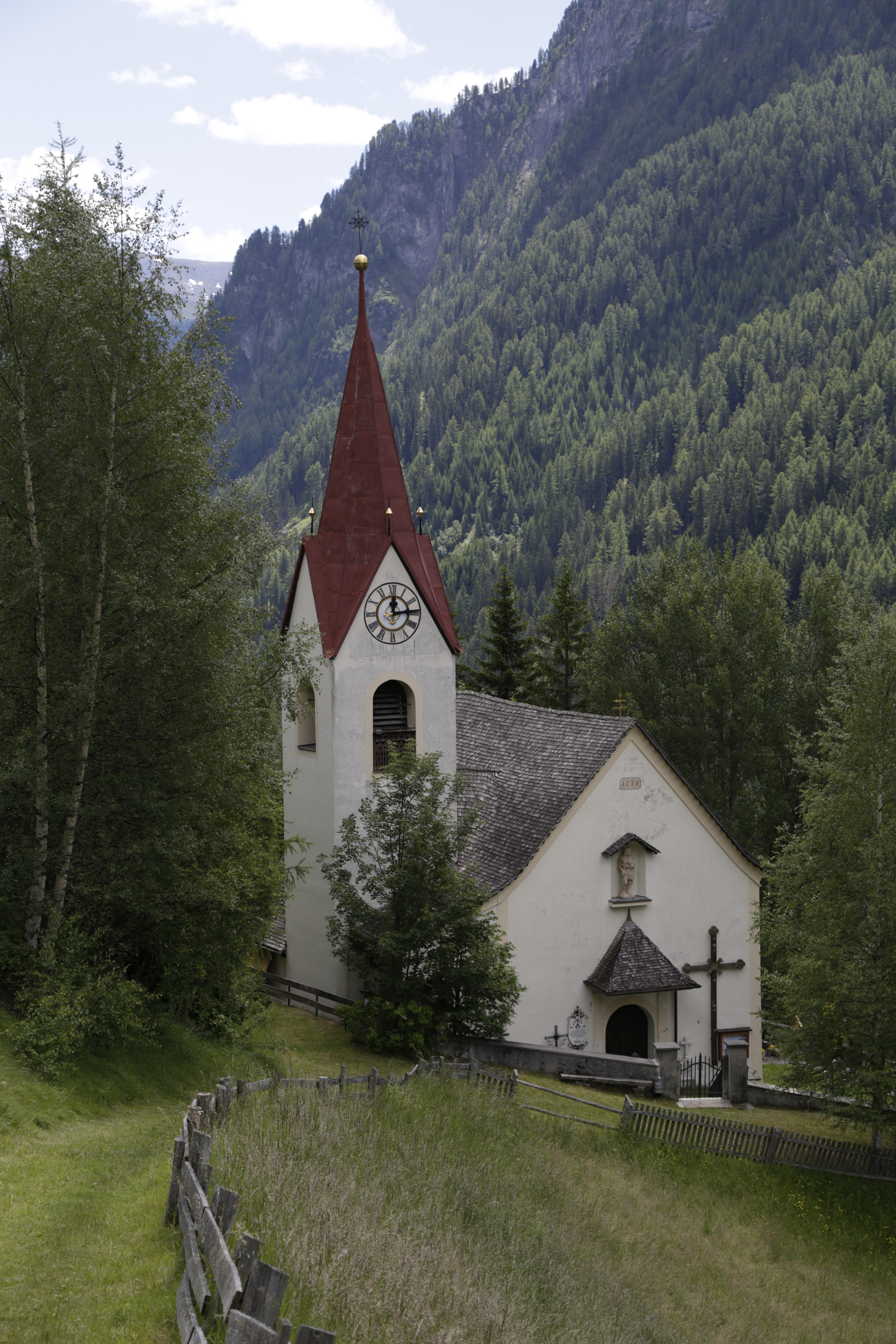 Die römisch-katholische Expositurkirche Spiss ist dem Heiligen Johannes der Täufer geweiht, und ist denkmalgeschützt.´